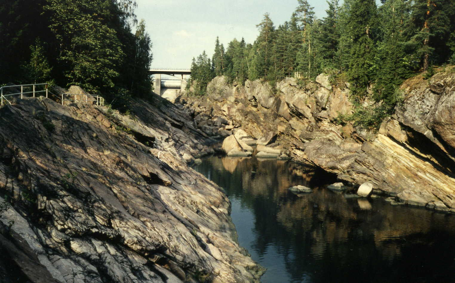 Durch ein Stauwehr trockene Wasserfall von Imatra (FIN)